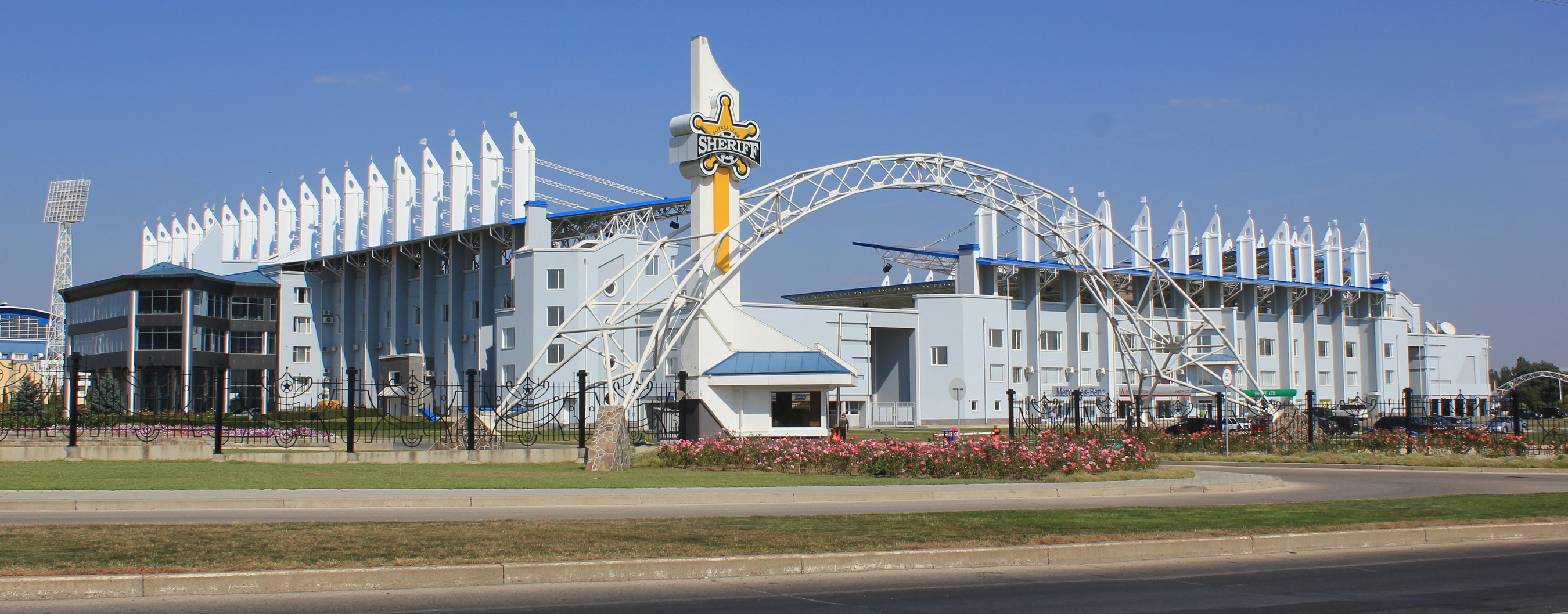 Sheriff-Sportpark am Stadtrand von Tiraspol, Transnistrien.